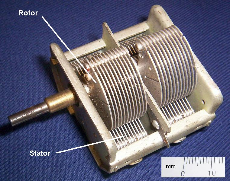 Drehkondensator (AM-Transistorradio, ca. 1970)